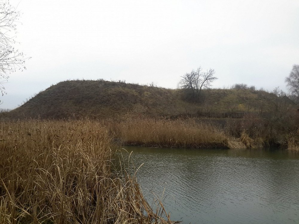 Лукомскае гарадзішча